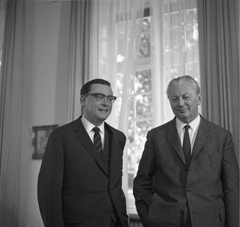 Bundeskanzler Kiesinger empfängt den Reg. Bürgermeister von Berlin, Klaus Schütz